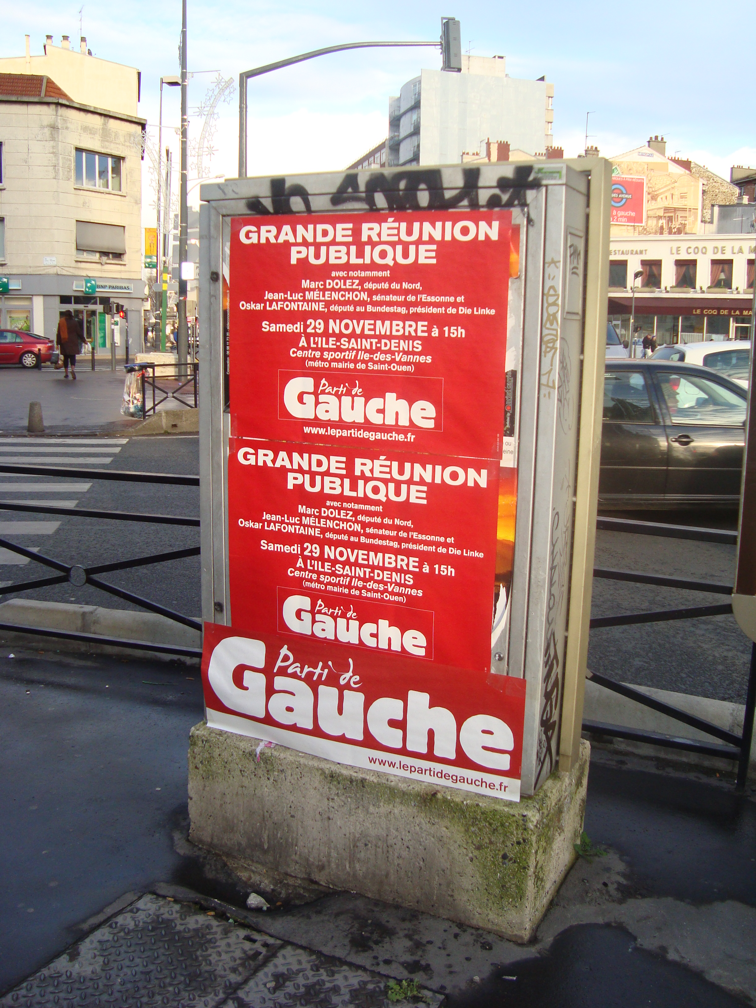 Affiches du meeting de lancement du Parti de gauche